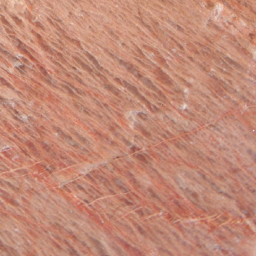 Pertiitse struktuuriga kaaliumpäevakivi mikrokliin